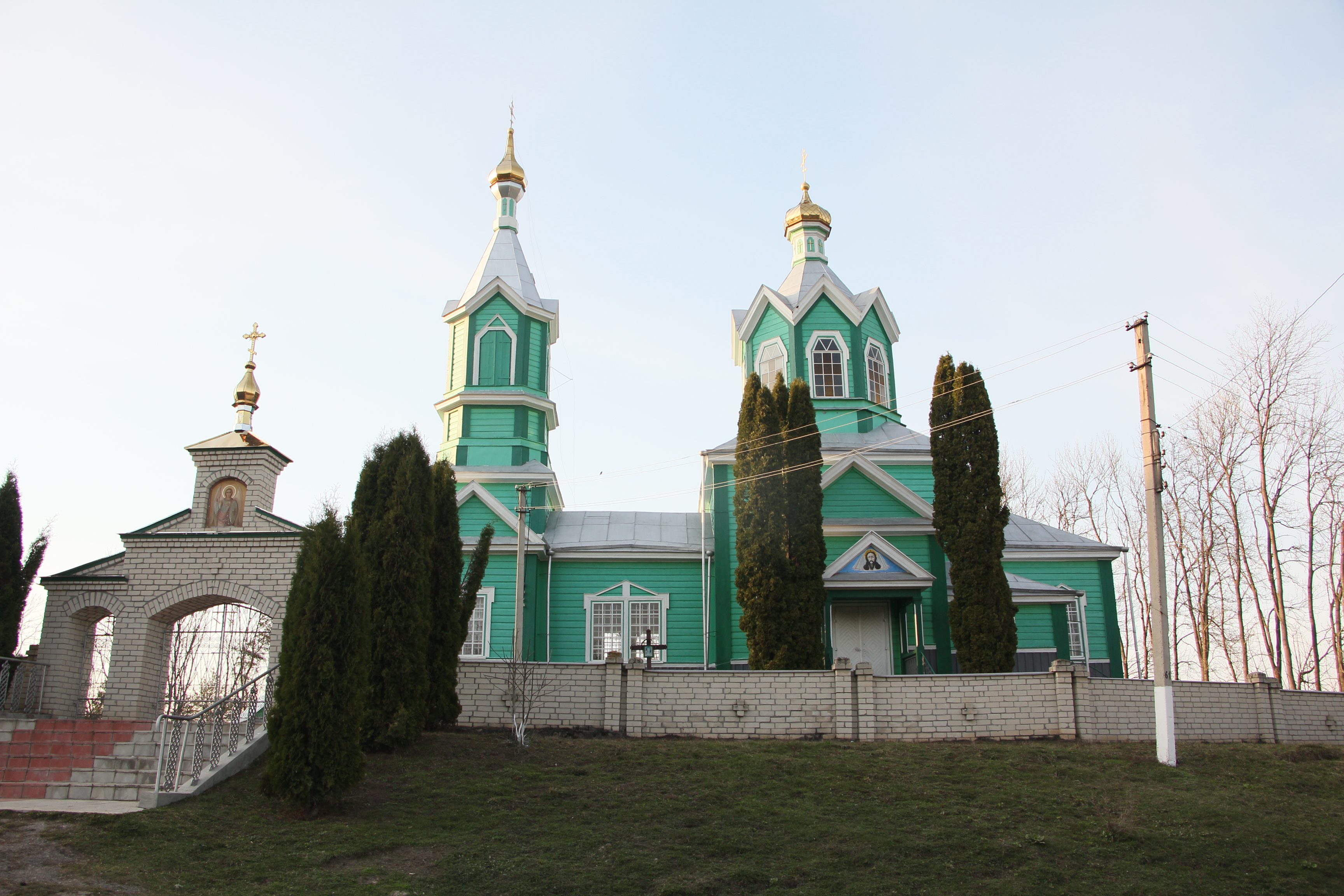 Стара дерев'яна церква в селі Буглів Лановецького району Тернопільської області